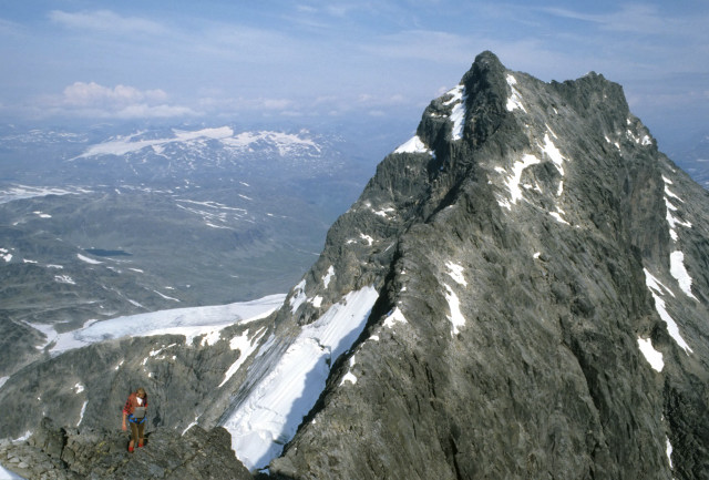 Styggedalsryggen sett fra Sentraltind, 1984. Foto: Tore Røraas.